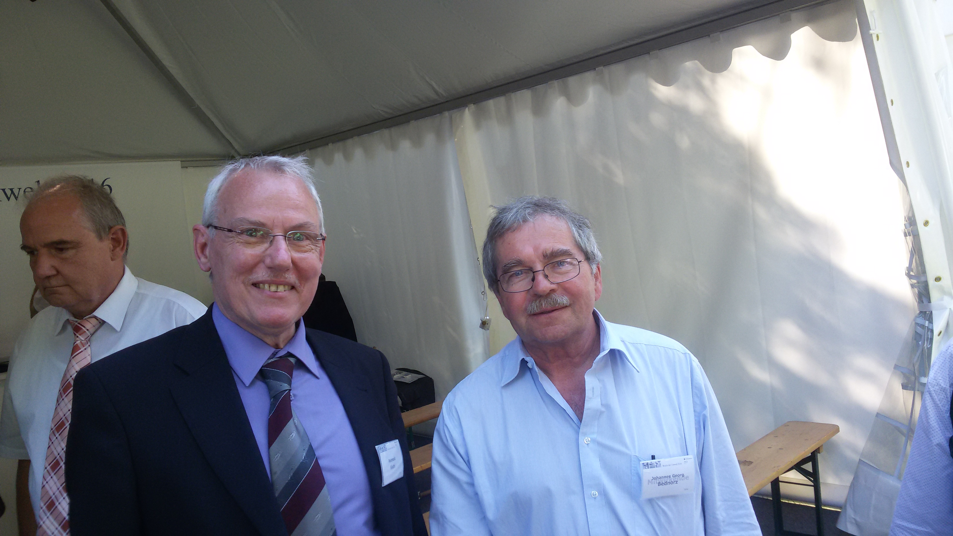 Reinhold Kiehl und Johannes Georg Bednorz bei der DBU auf Einladung des Bundespräsidenten Joachim Gauck